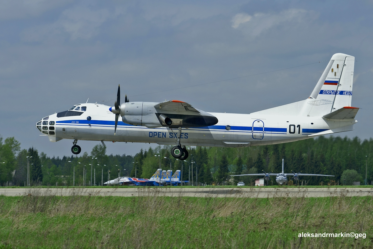 An-30 01 black. "Open Skies"